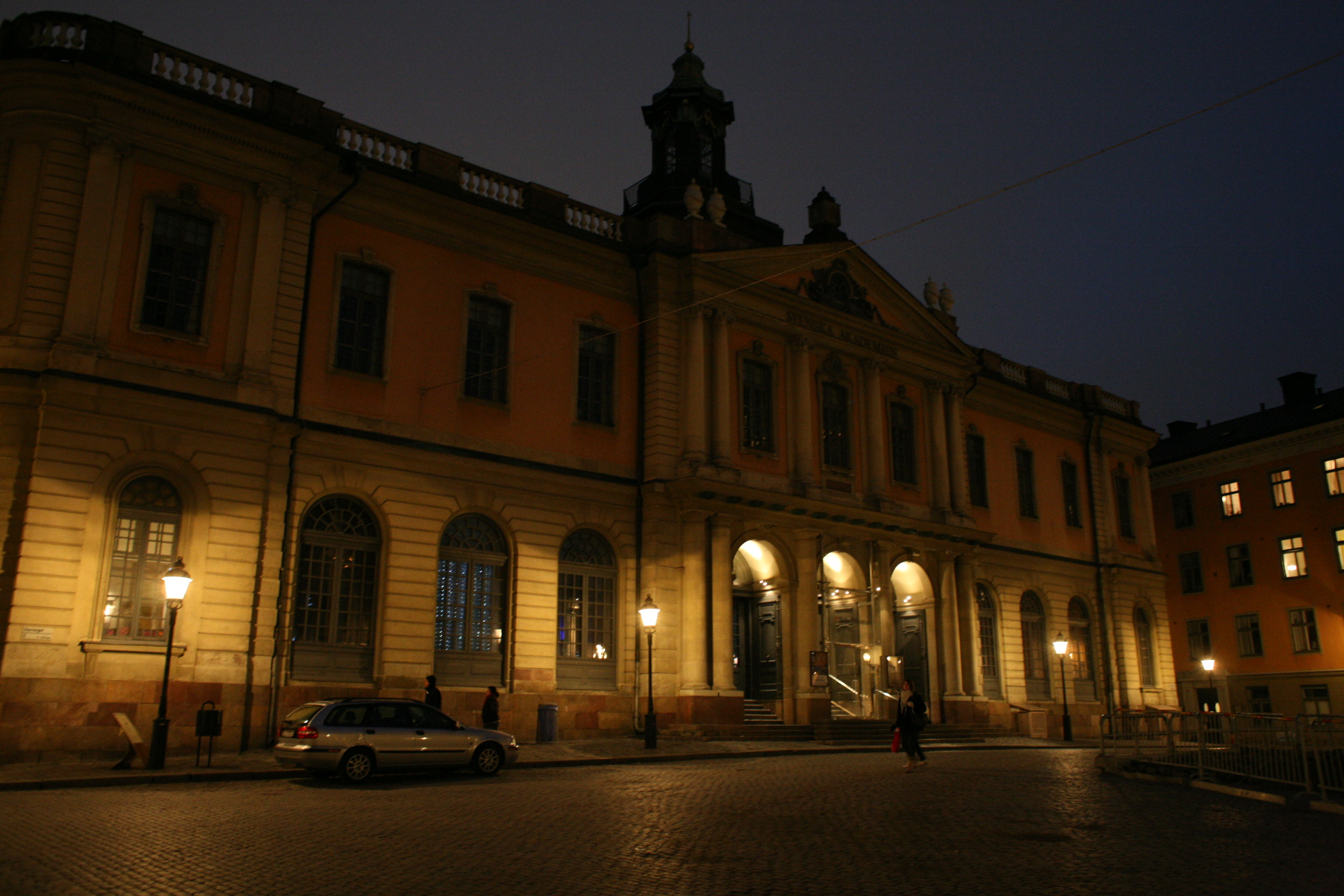 Nobelmuseet i Gamla Stan